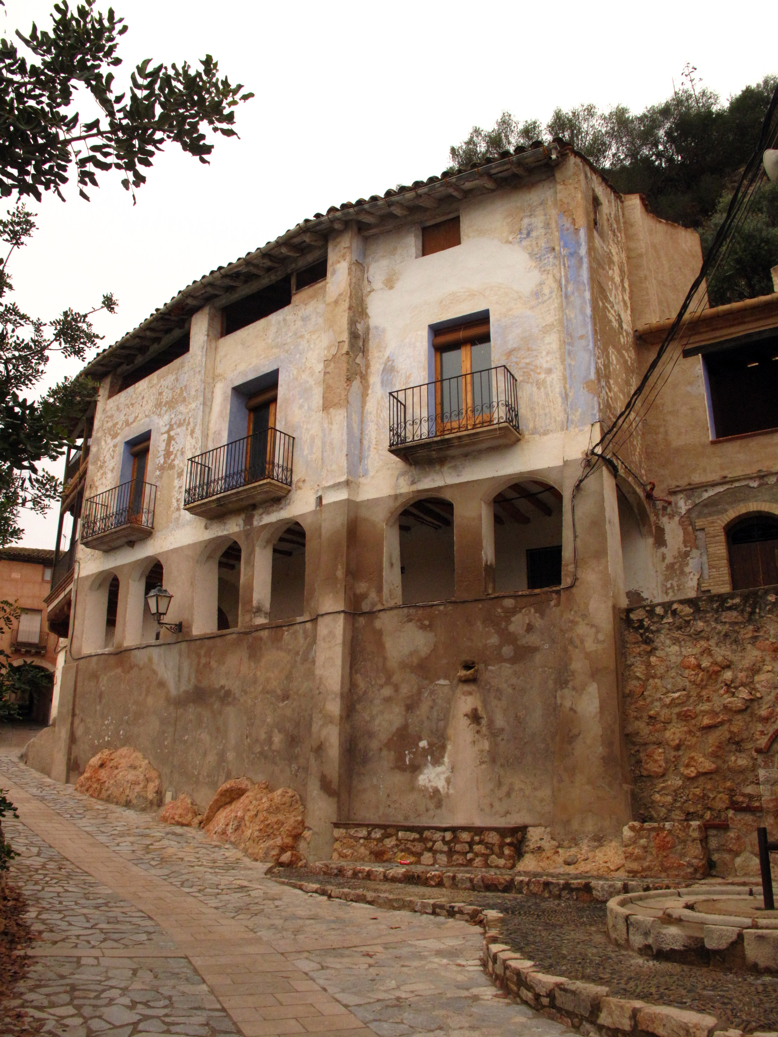 Casa Costa (Miravet)